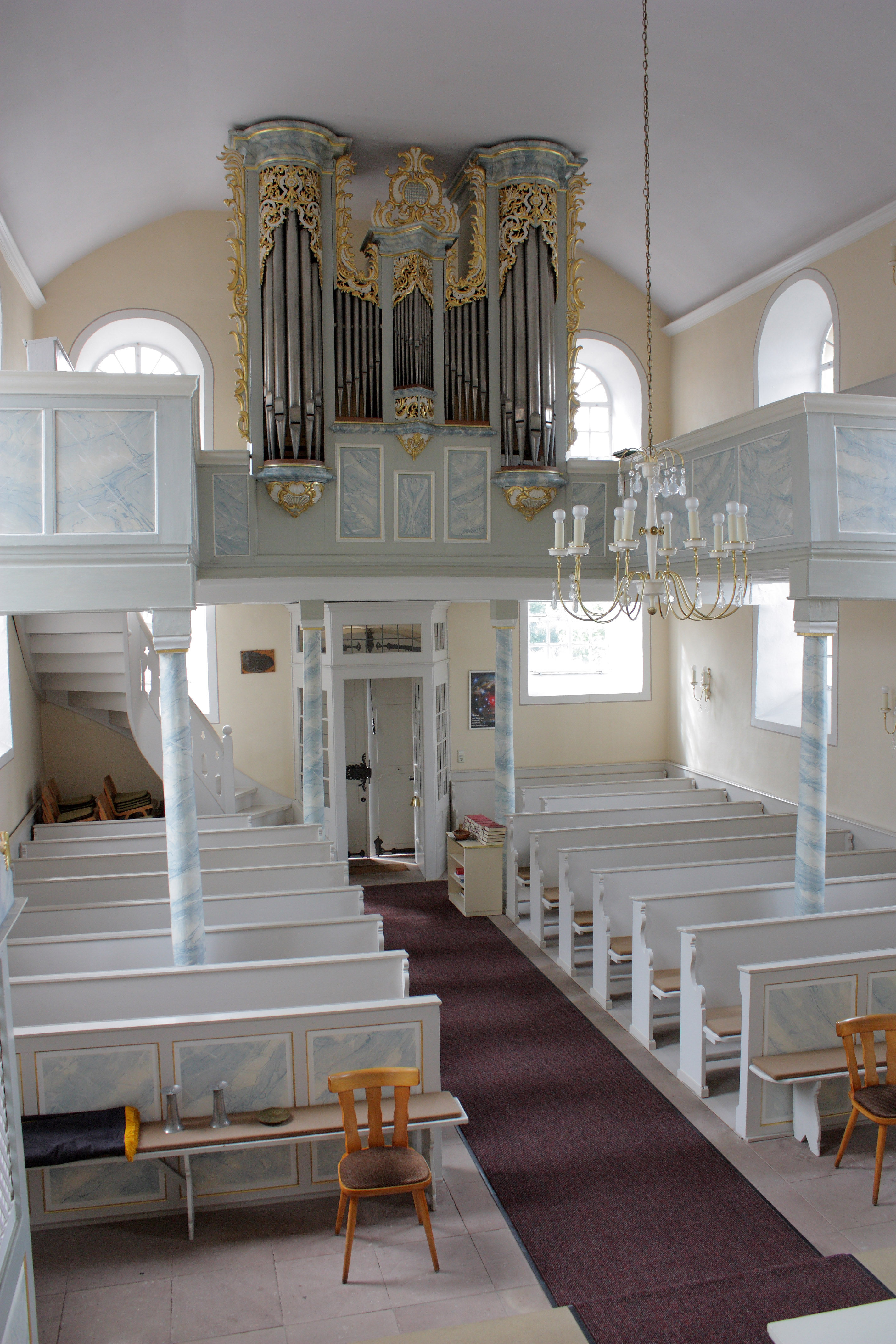 kirche hochstätten - kirchenschiff, innenraum mit empore und orgel